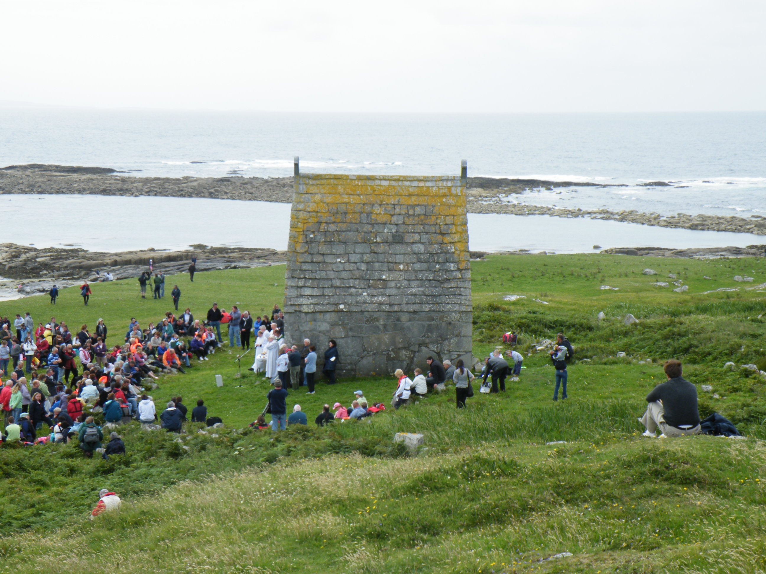 Teampall Mhic Dara, Lá Mhic Dara, Oileán Mhic Dara, Carna, Co. na Gaillimhe